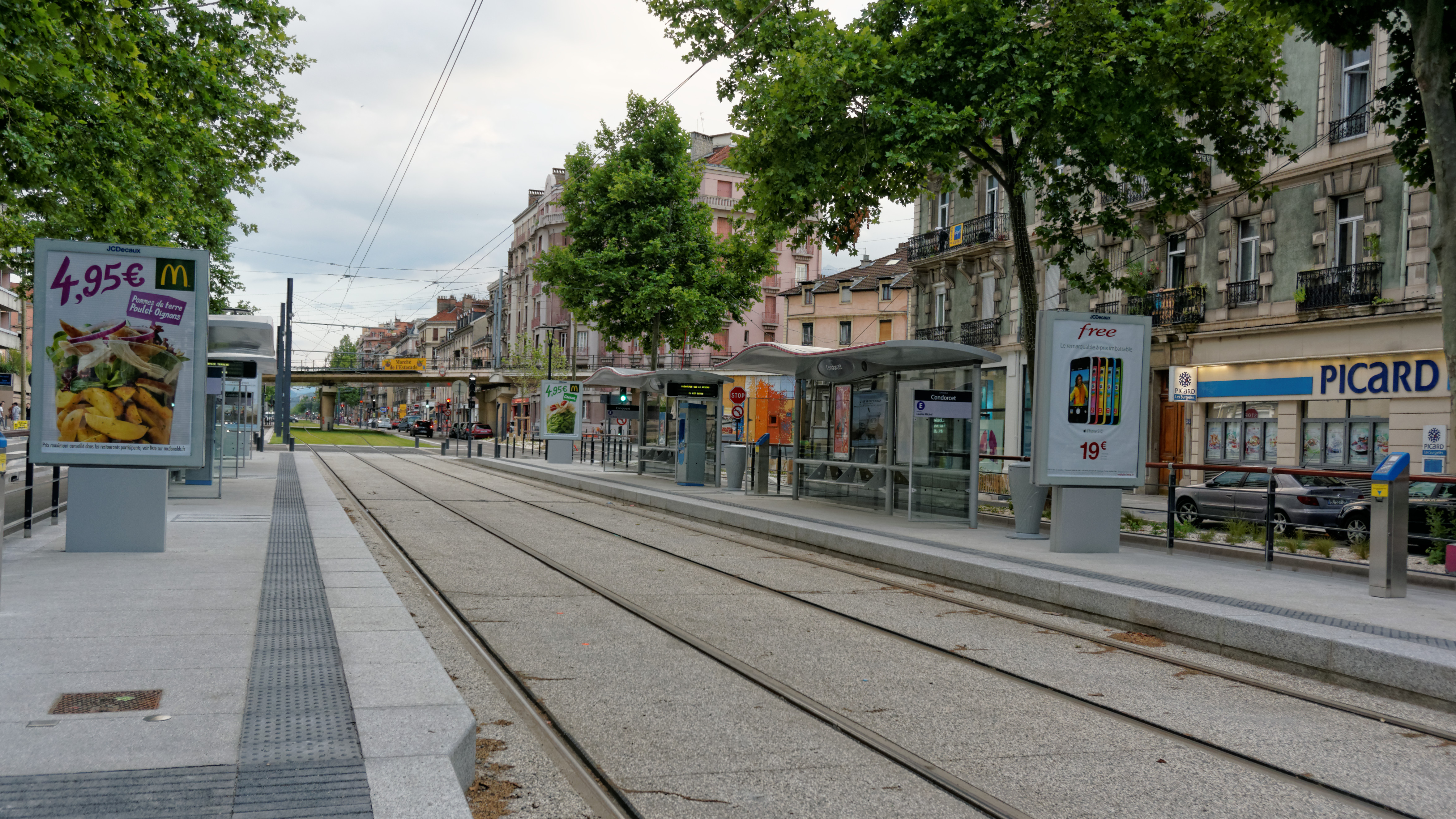 La station Condorcet sur la ligne E du tramway de Grenoble